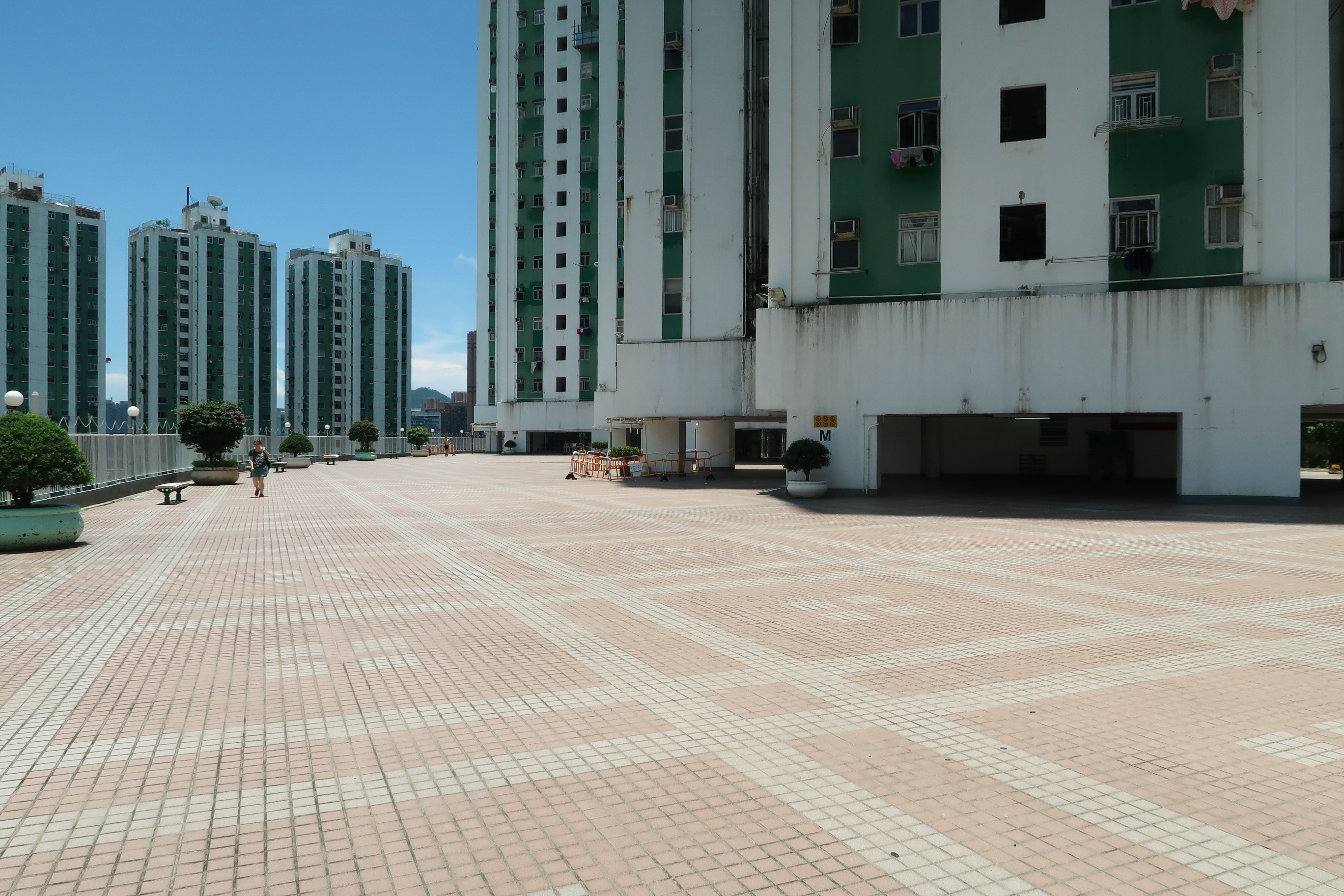 Allway Gardens Podium Garden